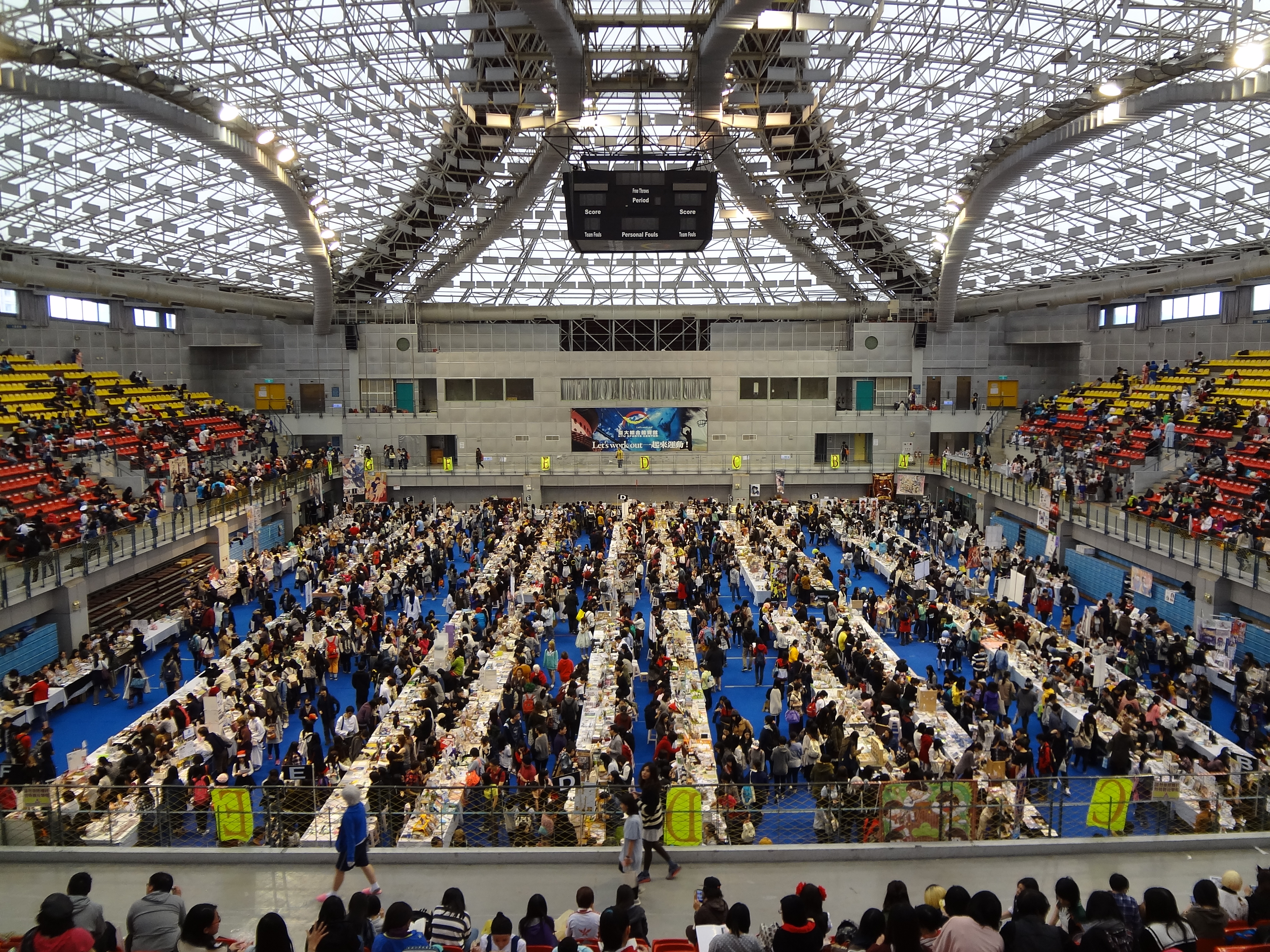 第44屆台灣同人誌販售會，國立臺灣大學綜合體育館3樓展場。